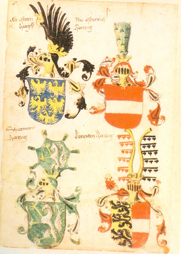 Ingeram-Codex der ehemaligen Bibliothek Cotta [I] Alt Osterri/ch hergest (Herzog) Nu Osterrich/Hertzug Styermarck/hertzug Kerenten Hertzug